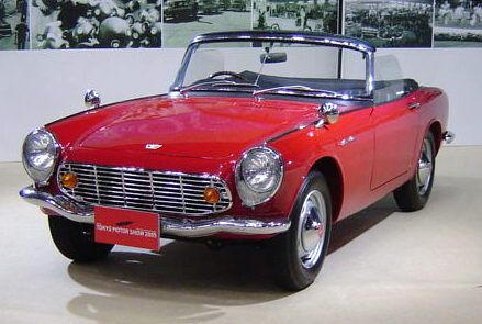 2005東京モーターショーに展示されていたホンダ・S600